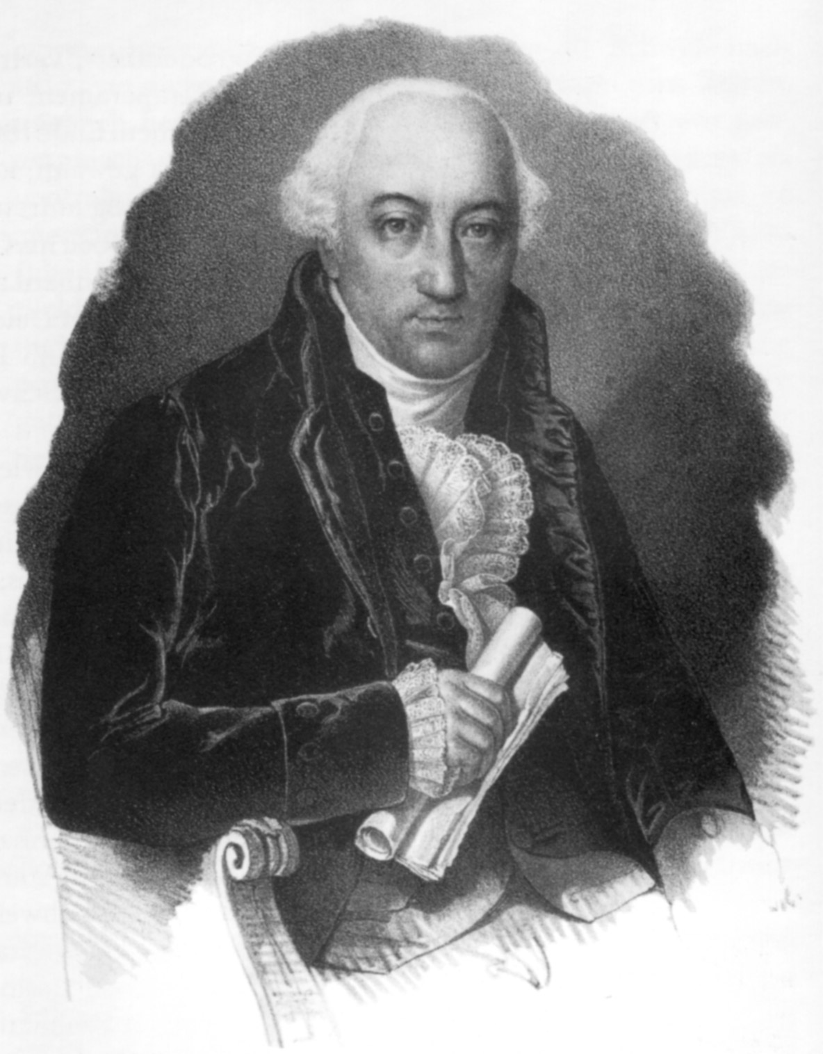 Hans von Reinhard (1755–1835), einer der einflussreichsten Politiker Zürichs und der Schweiz während der Mediation und Restauration. Lithographie eines Gemäldes von Johann Oeri, das 1804 anlässlich der Kaiserkrönung Napoleons in Paris entstand